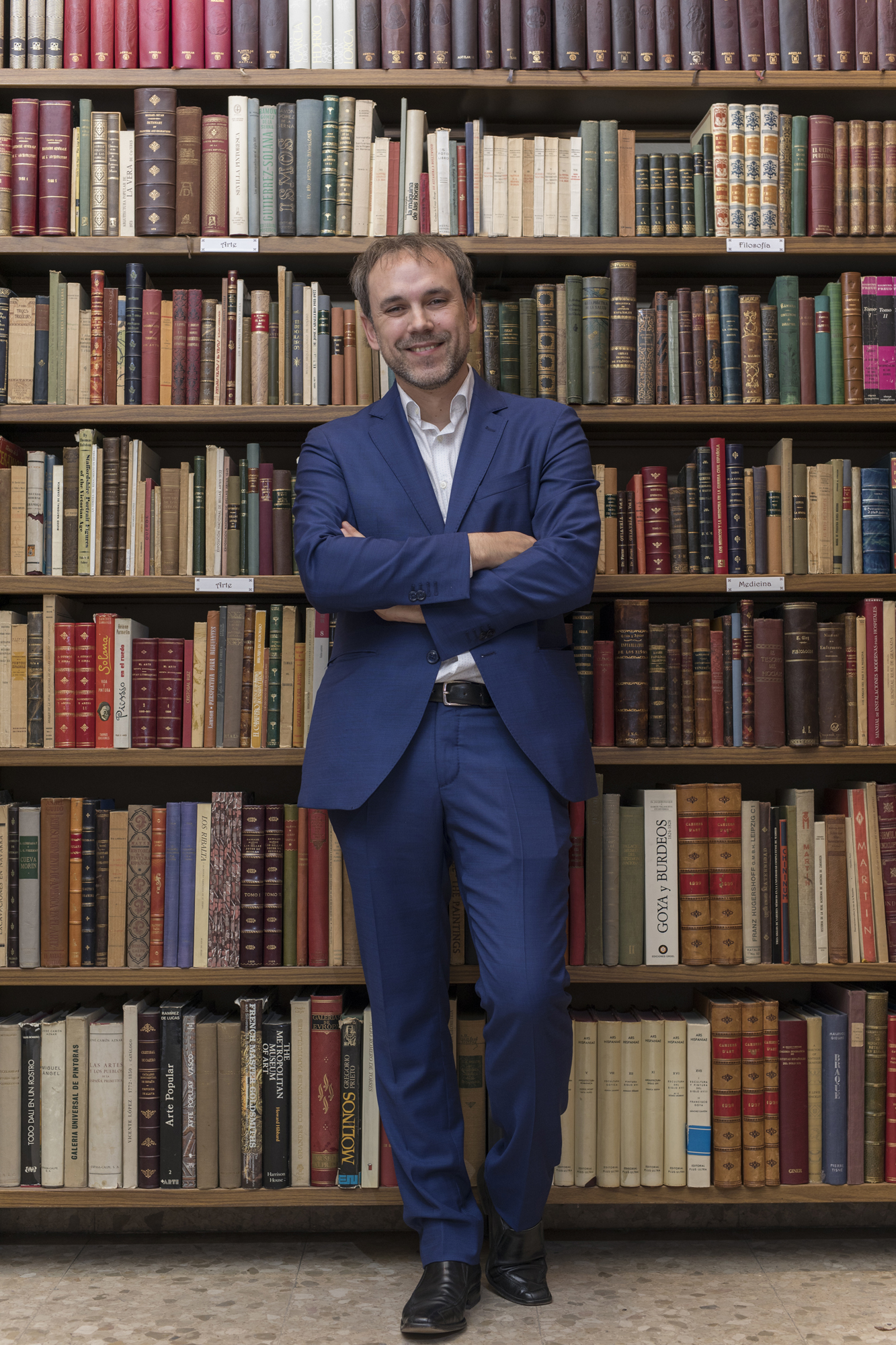 El escritor Luis Zueco en la Libreria del Prado en Madrid